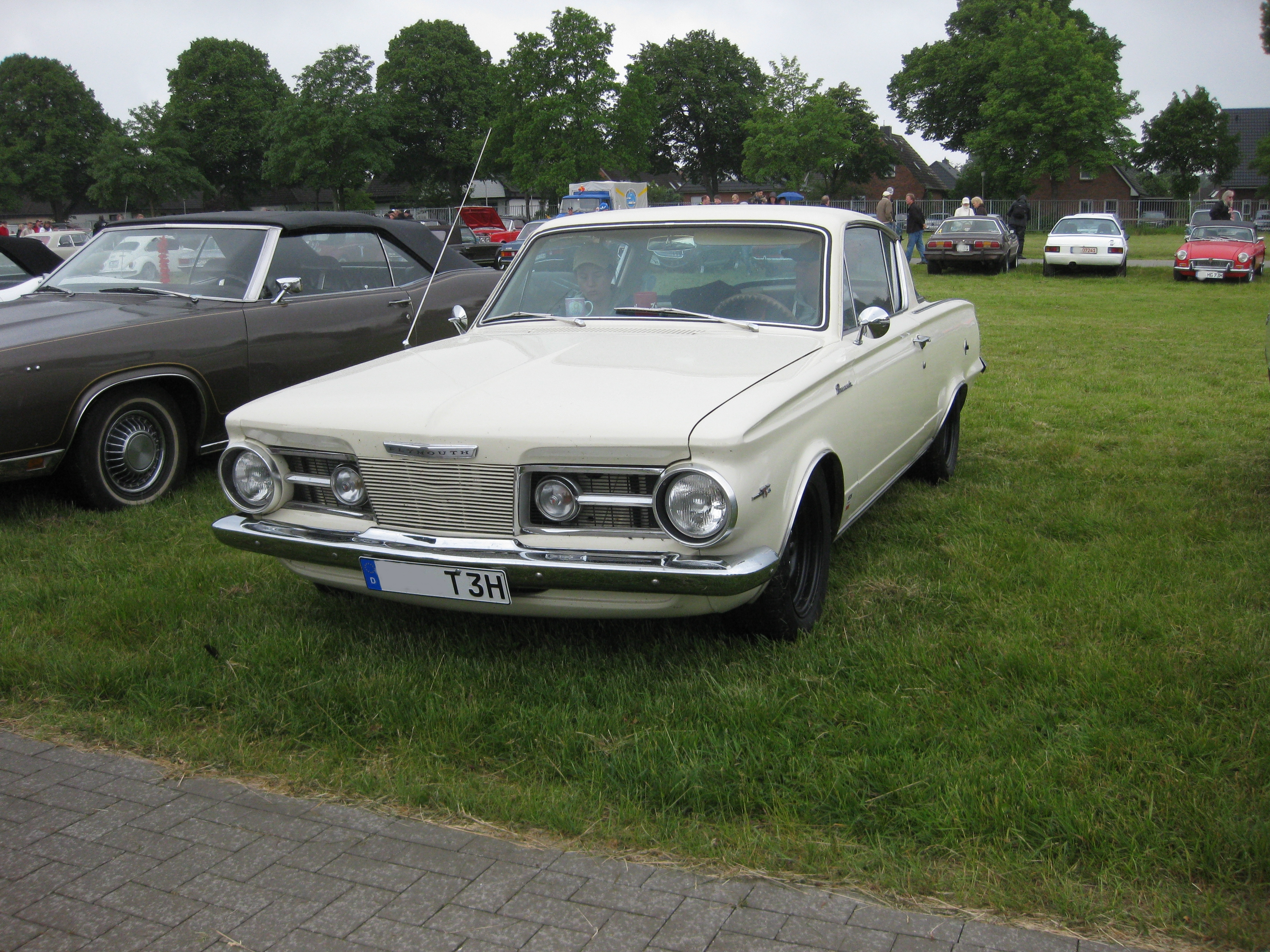 Plymouth Barracuda